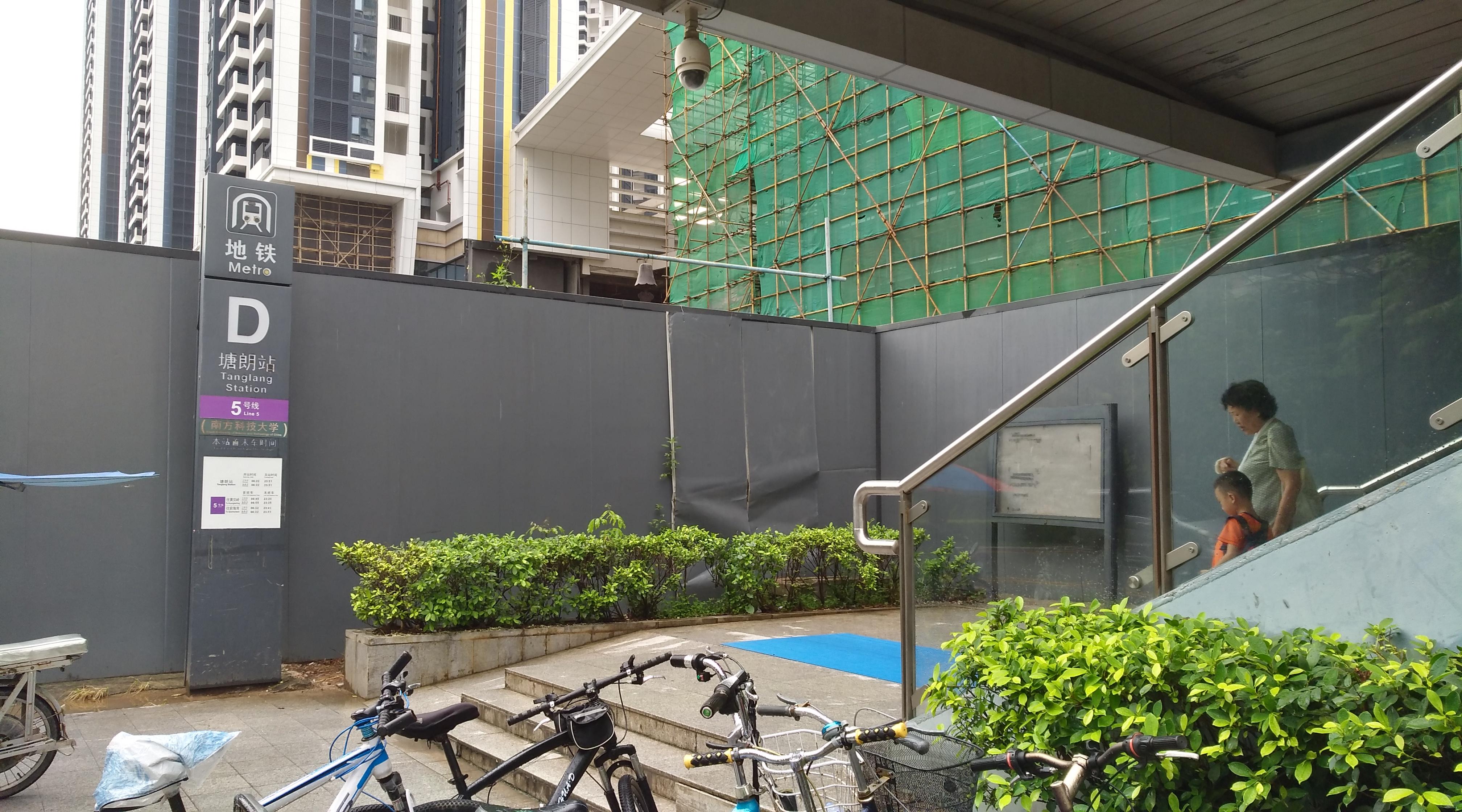 深圳地铁 5号线 塘朗站 D出口